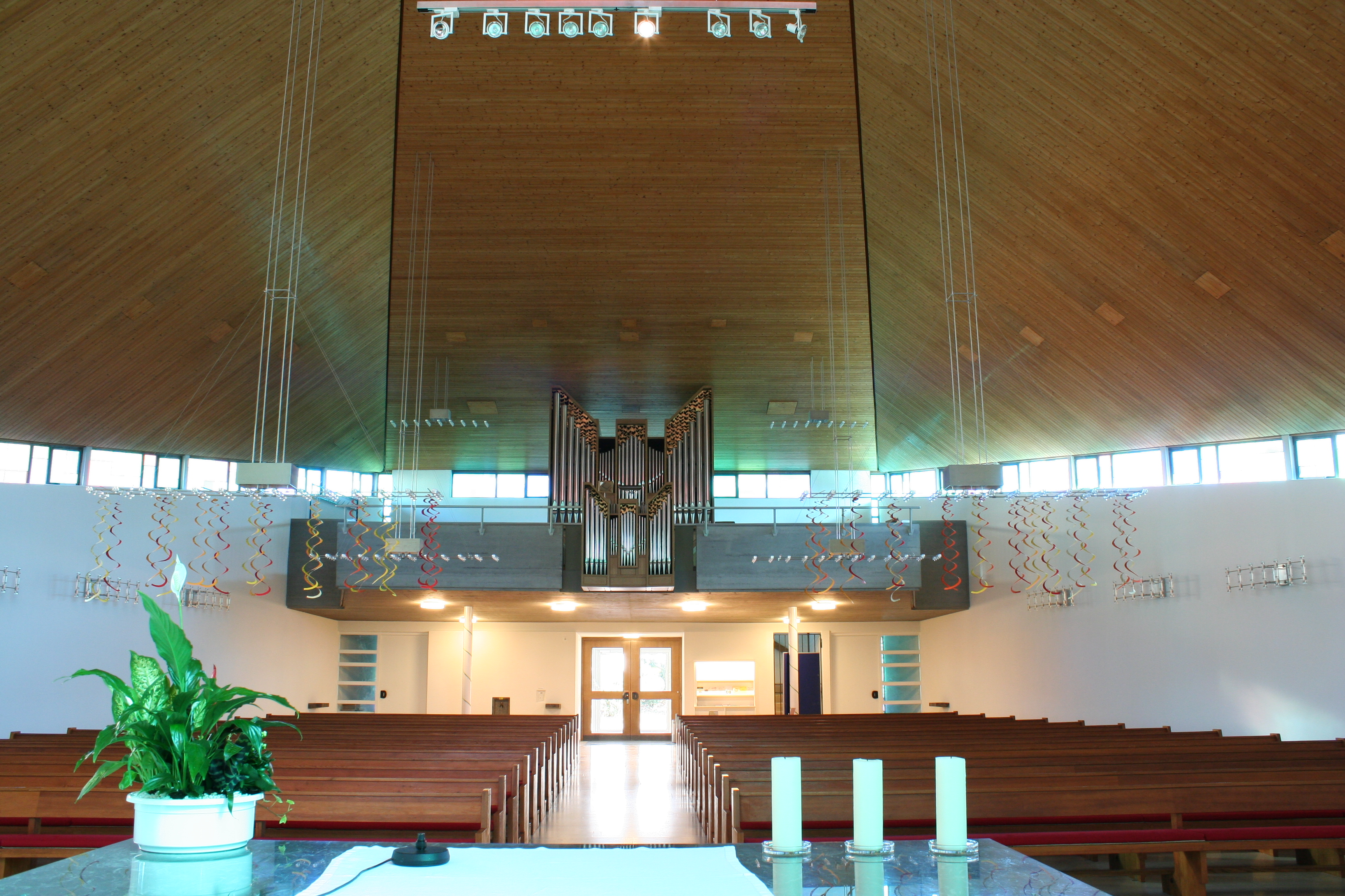 Römisch-katholische Pfarrkirche St. Benignus Pfäffikon ZH, Innenansicht